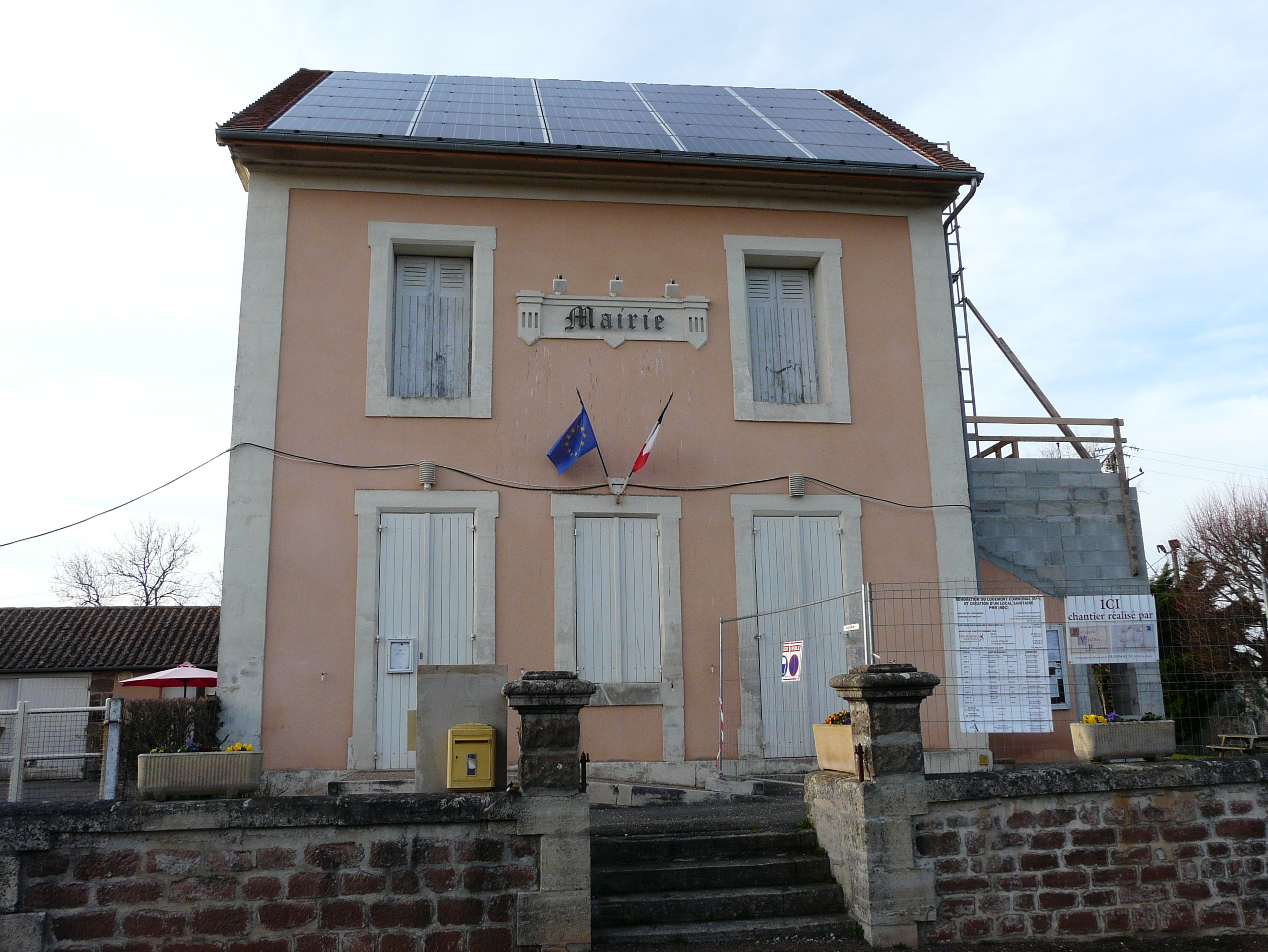 La mairie de Boisseuilh, Dordogne, France.